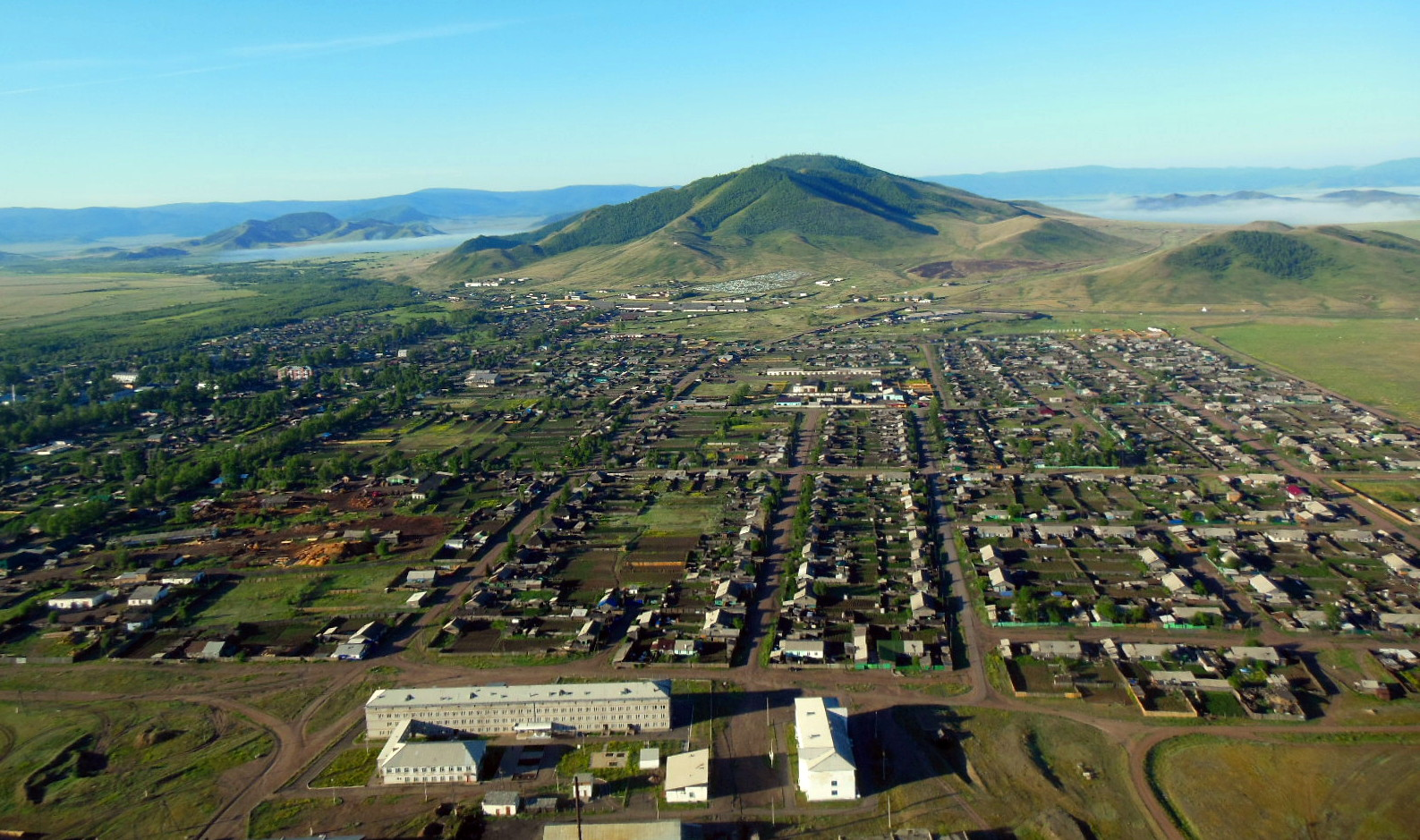 Вид города Туран с мотопараплана. 2013г.